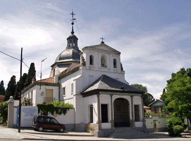 Ermita de San Isidro en Madrid, situada en el paseo de la Ermita del Santo frente al paseo del Quince de Mayo. Construida en 1725 por Baltasar de Zúñiga, marqués de Valero, bajo el reinado de Felipe V.